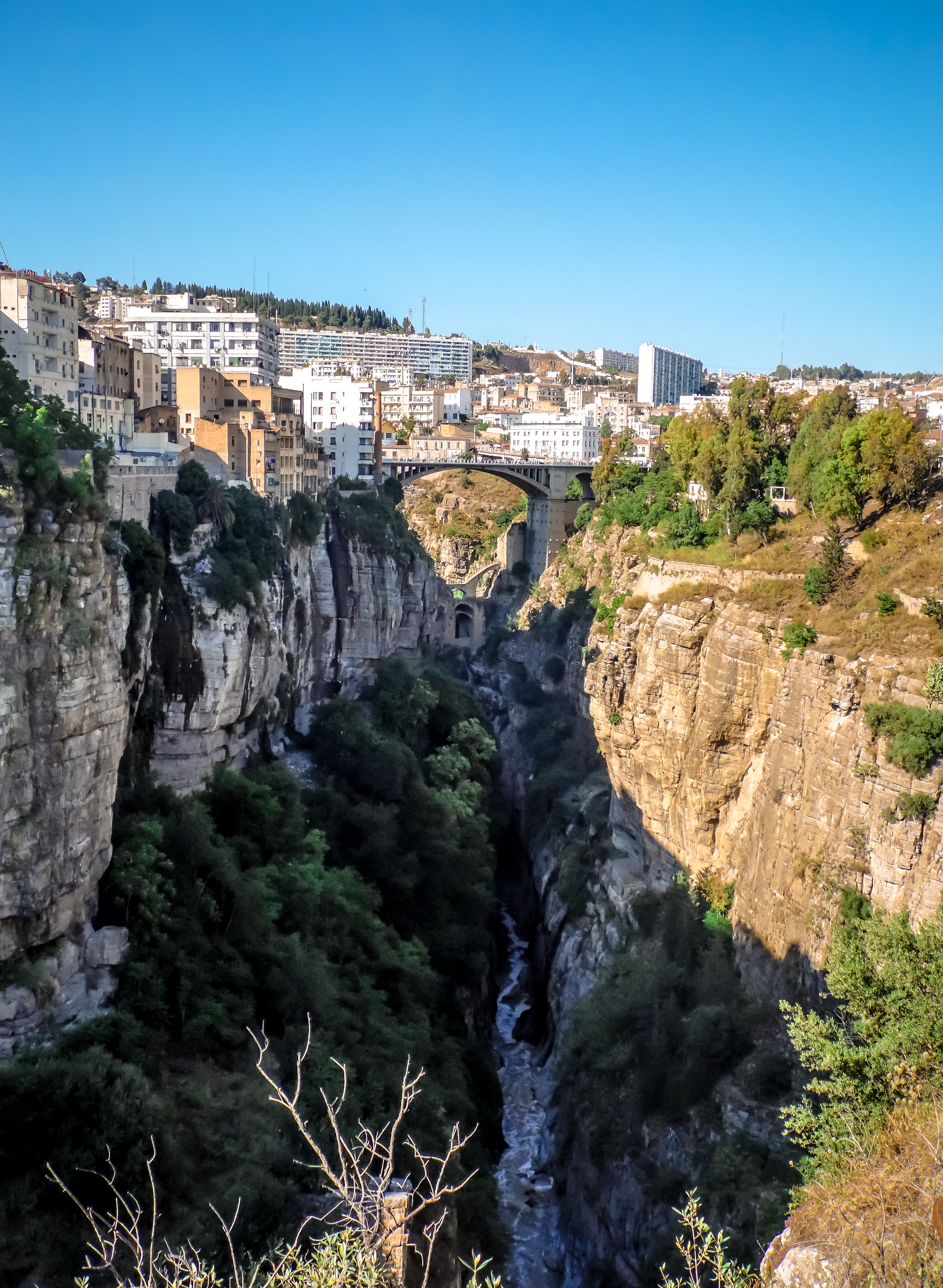 Sur cette photo vous pouvez voir les gorges et l'oued rhumel passant au centre de la ville de Constantine, classees patrimoine naturel en 1968, au fond vous pouvez apercevoir le pont romain d'Antonin et au dessus de ce dernier le pont d'El Kantara. Et la ville de Constantine en haut.